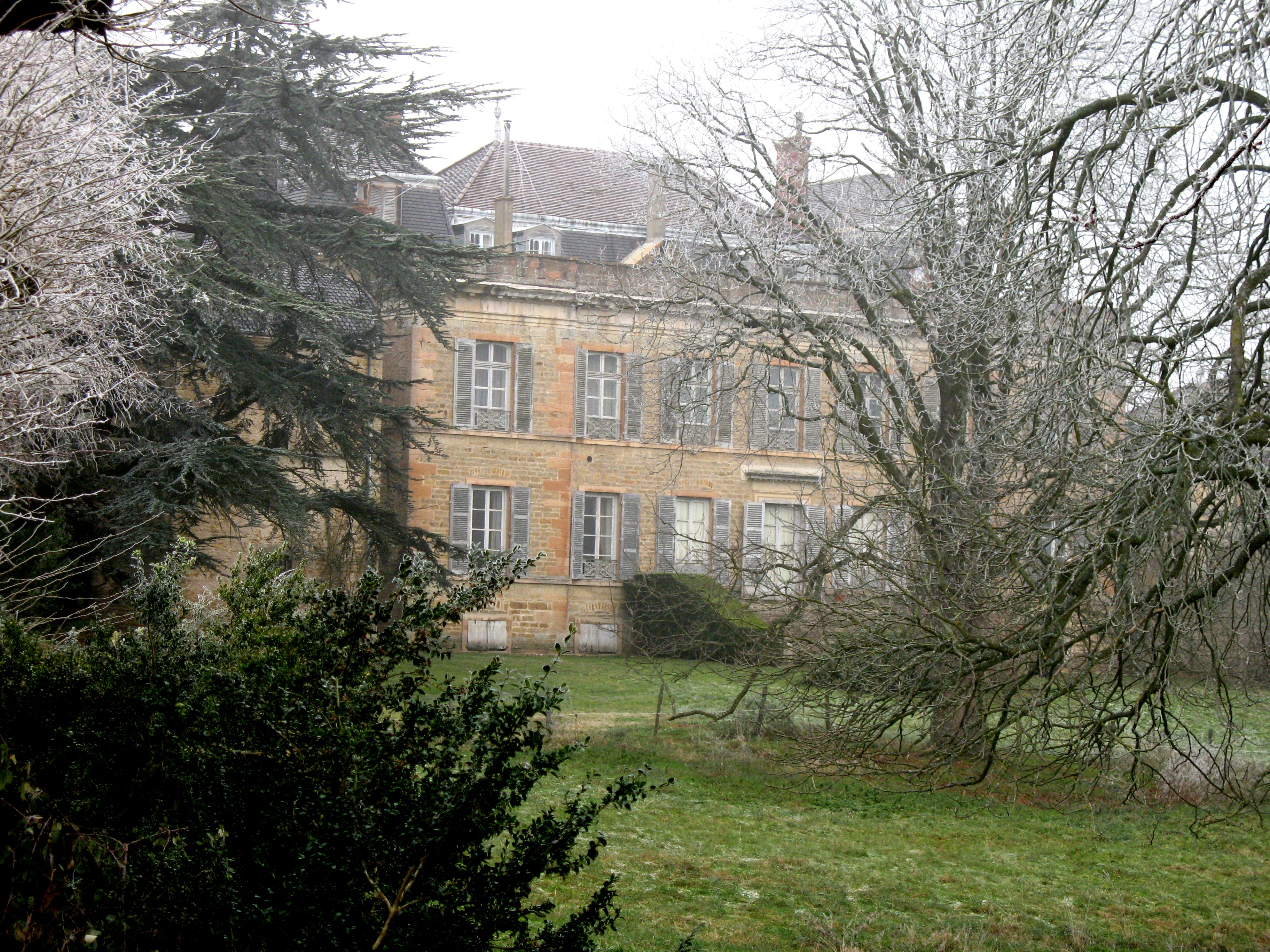 château de la Combe - Prissé (Saône-et-Loire)